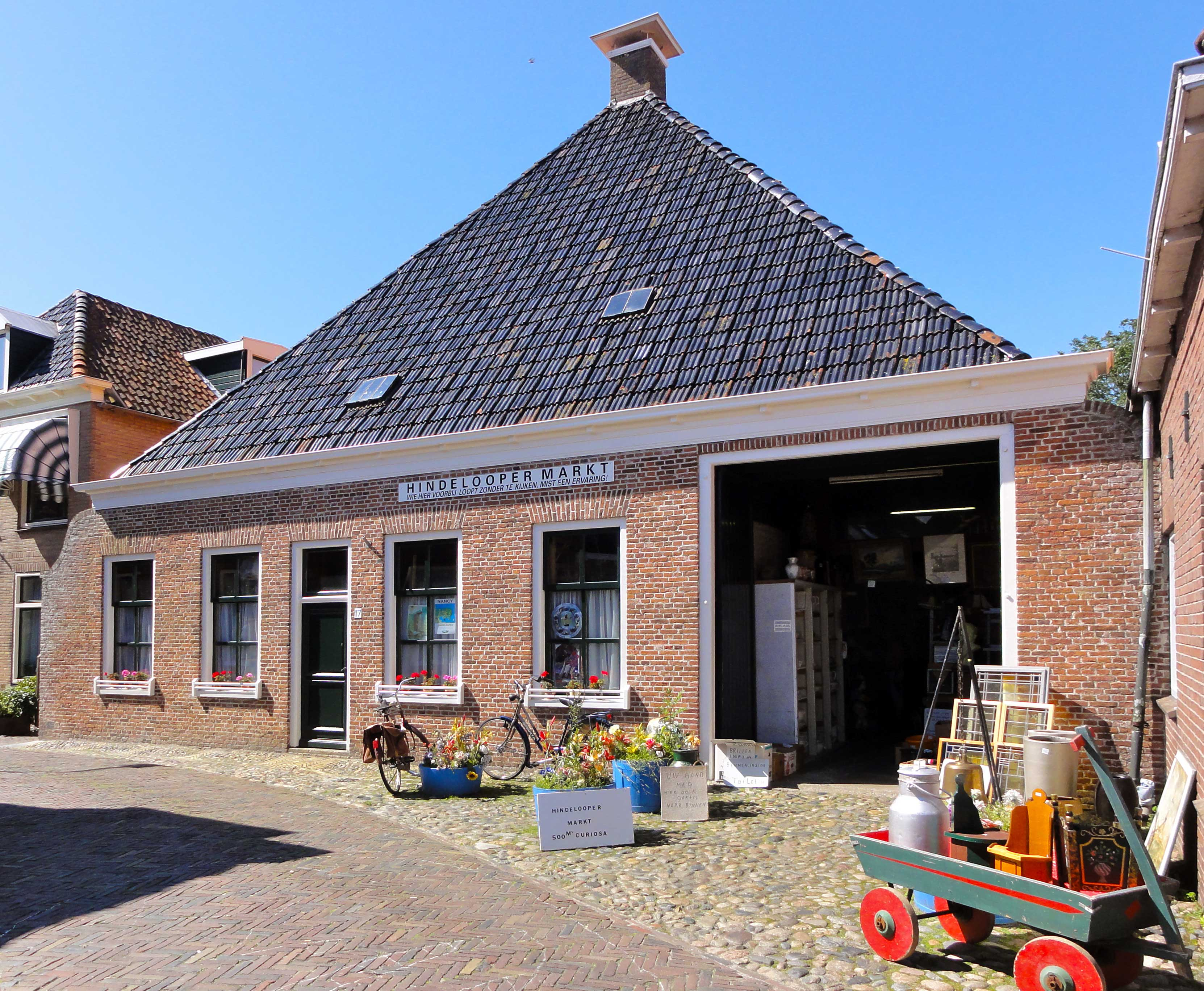 Tuinen 17 te Hindeloopen